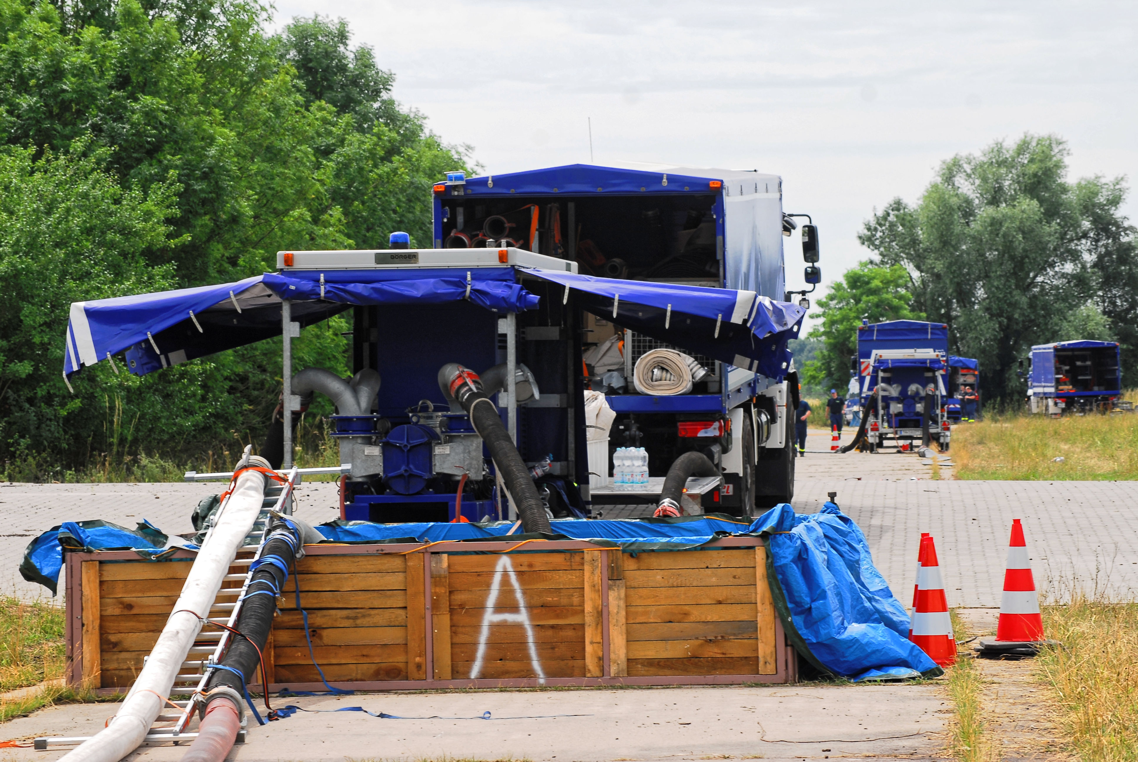 Börger Drehkolbenpumpe 5000 l/min mit 8000 Liter Behelfsbecken.